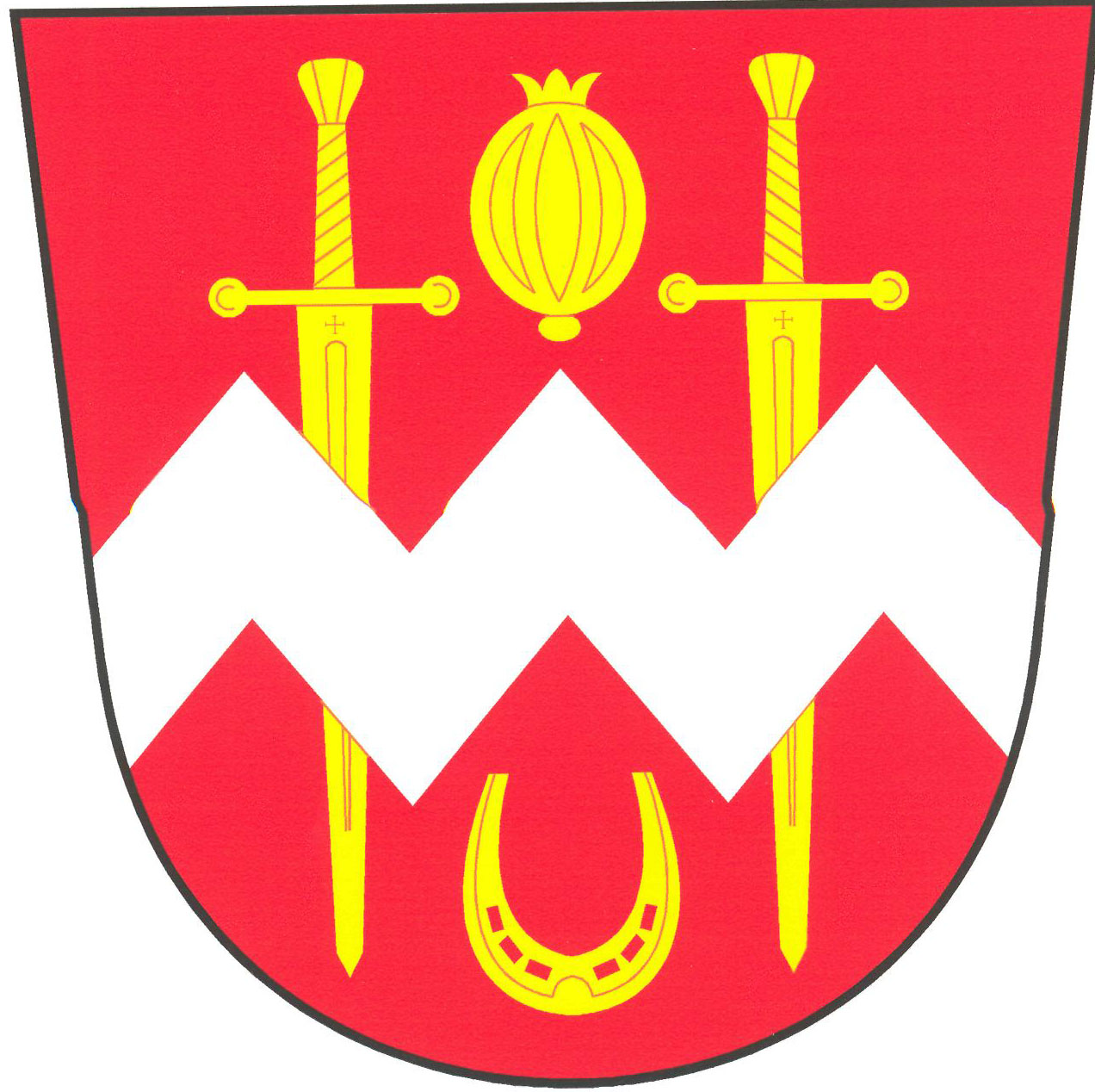 Znak obce Čermná (okres Domažlice)